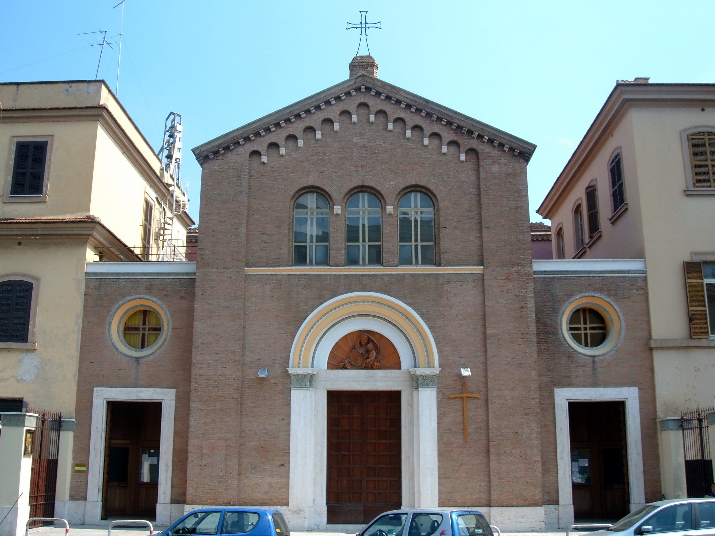 Chiesa di Santa Maria del Buon Consiglio, a Roma, nel quartiere Tuscolano.